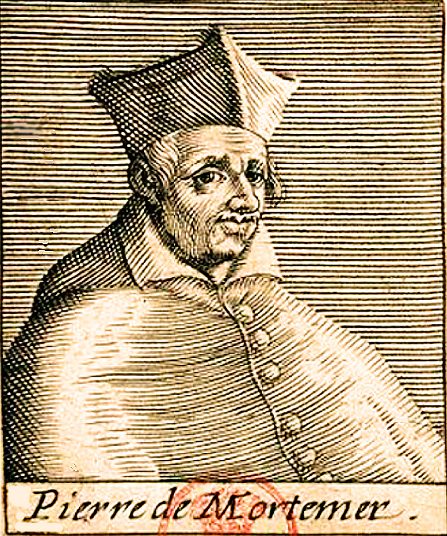 Cardinal Pierre de Mortemart